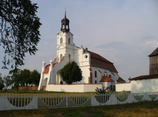 Ołobok - kościół pw. św. Jana Ewangelisty w zespole klasztornym cysterek